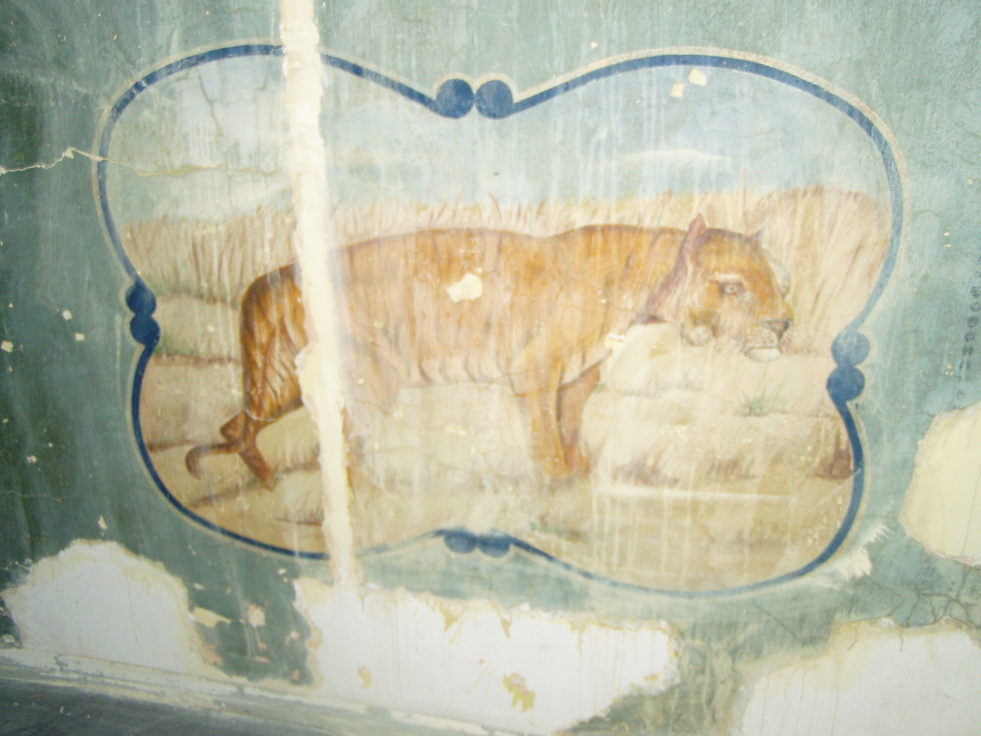 Wnetrze synagogi Chewra Thilim w Krakowie